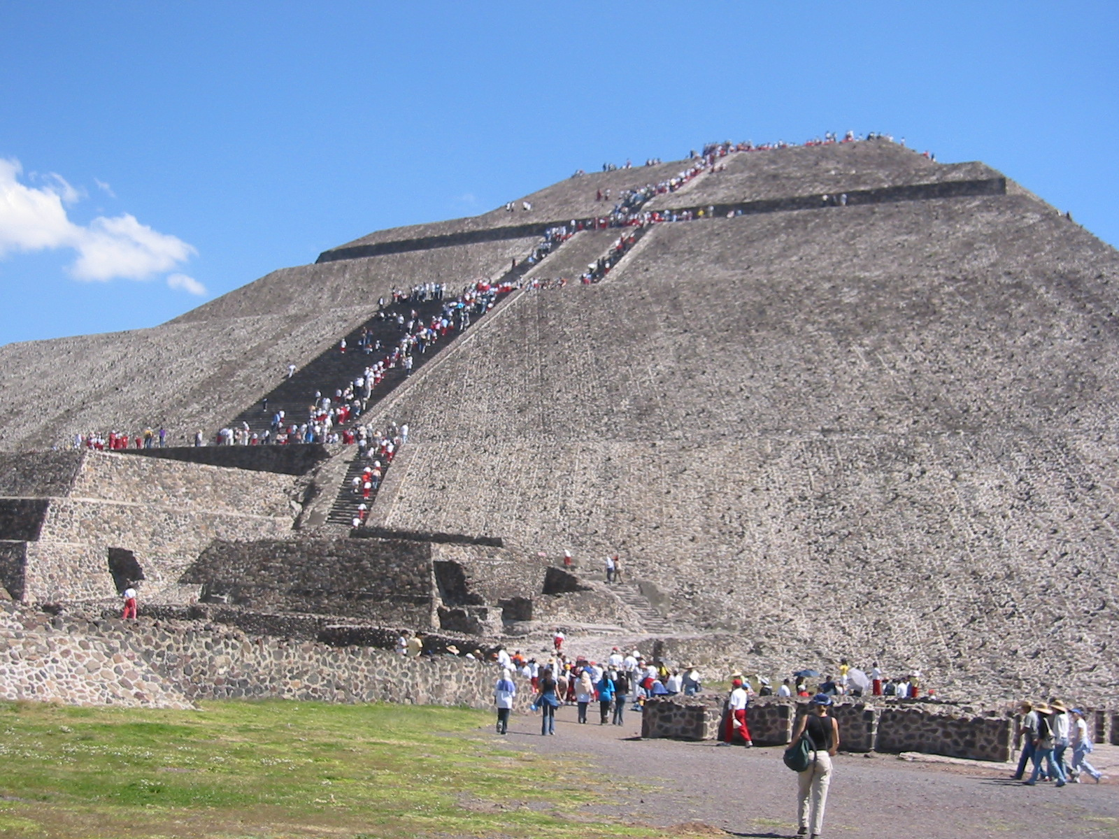 Piramid di Mexico.